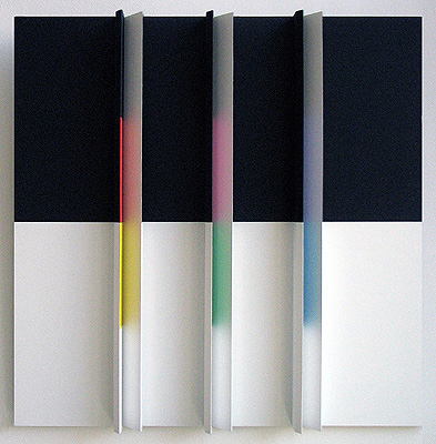 Farbgeneration I der 'Scheintrilogie', Bendin 2007